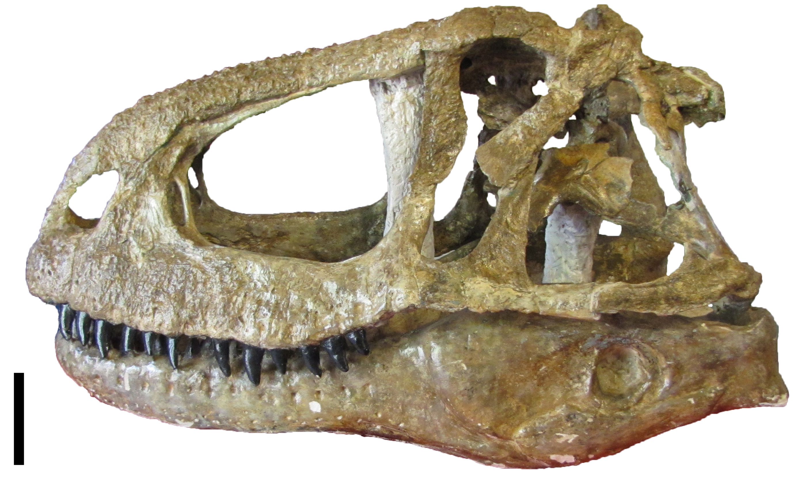 Reconstruction of the Abelisaurus skull with original bones of the holotype. Museo Provincial Carlos Ameghino, Cipolletti, Argentina. Scale = 10 cm